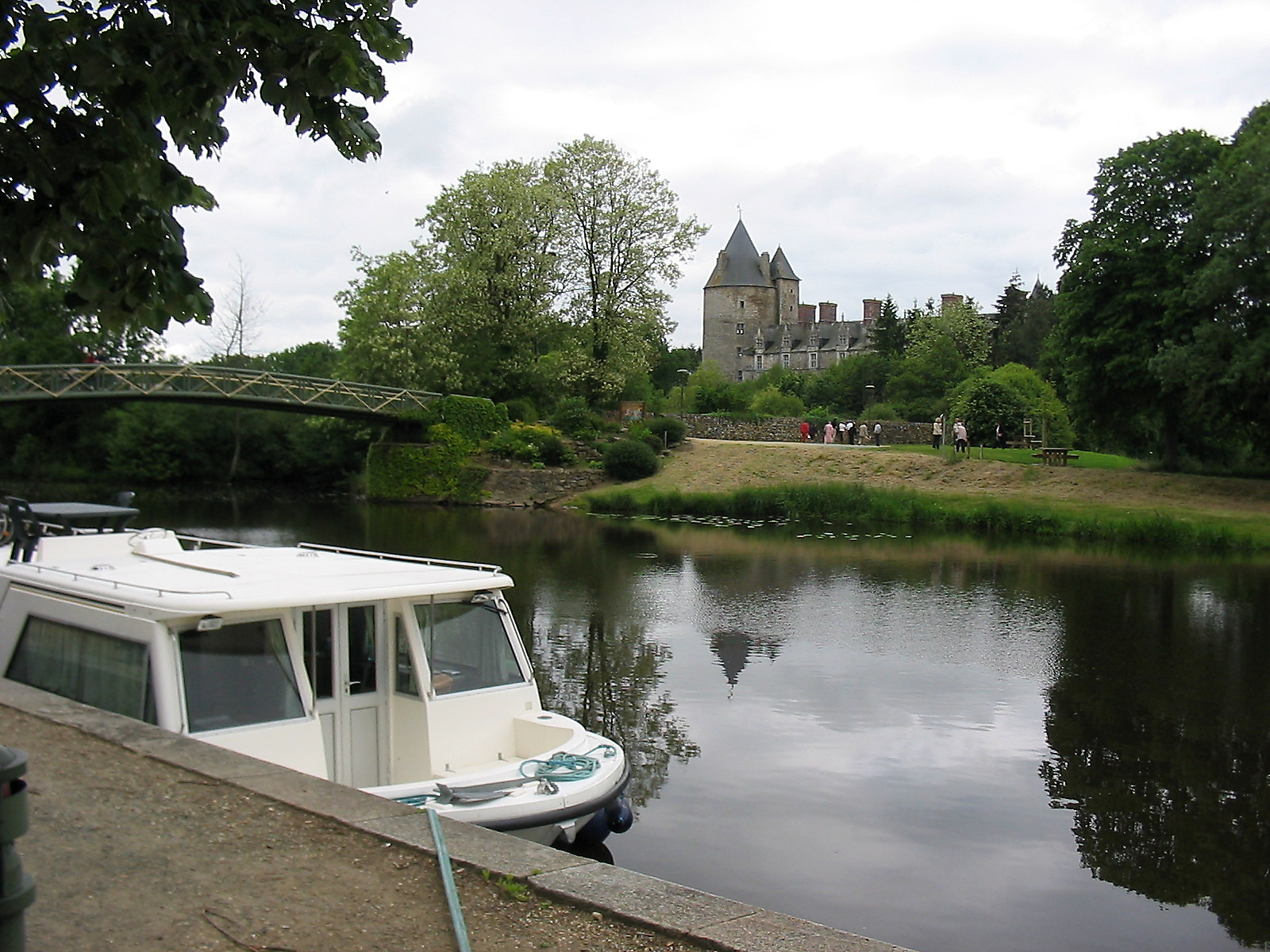 Im Hafen von Blain - Blick auf das Schloss Groulais